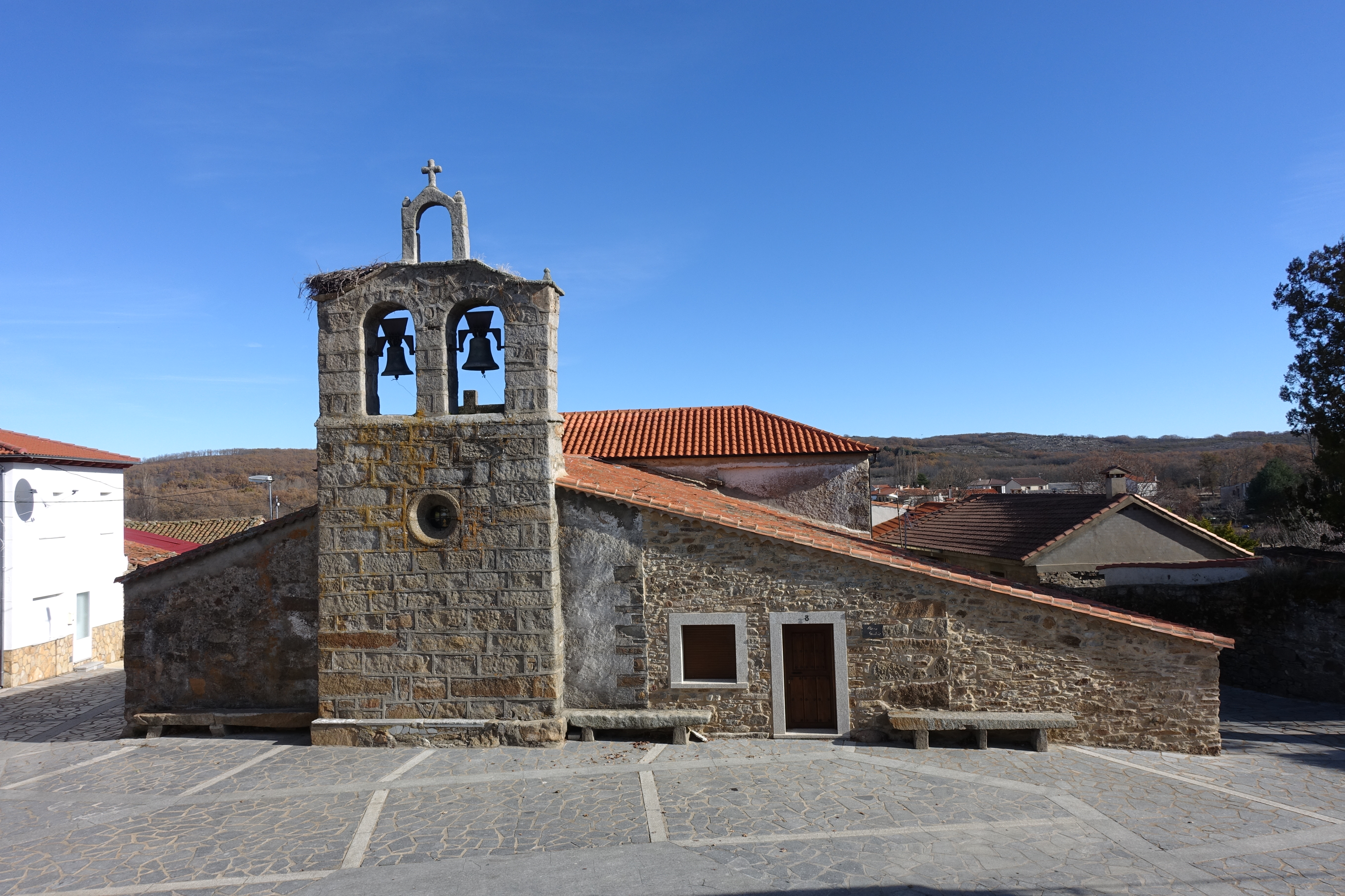 Iglesia de Nuestra Señora del Rosario, Nava de Francia (Salamanca, España).